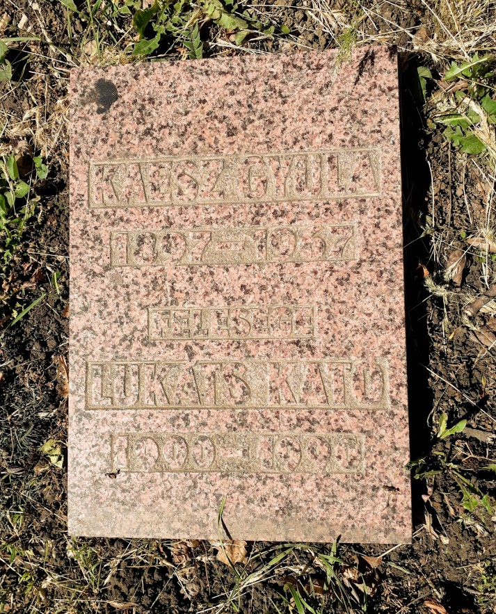 Kaesz Gyula (1897-1967) iparművész, építész, belsőépítész, grafikus, főiskolai tanár, az Iparművészeti Főiskola főigazgatója; bútor-, plakát- és bélyegtervező, könyvművész, urbanista, a modern magyar bútorművészet és ipari formatervezés egyik megalapítója; művészeti író, A Bútor szerkesztője, az Új Építészet társszerkesztője és felesége Lukáts Kató (1900-1990) grafikus, iparművész, plakát- és textiltervező; illusztrátor, könyvművész közös urnasírhelye a farkasréti temető 60/4-es urna parcellájában a 1 sor 59-es sírhelyén található.